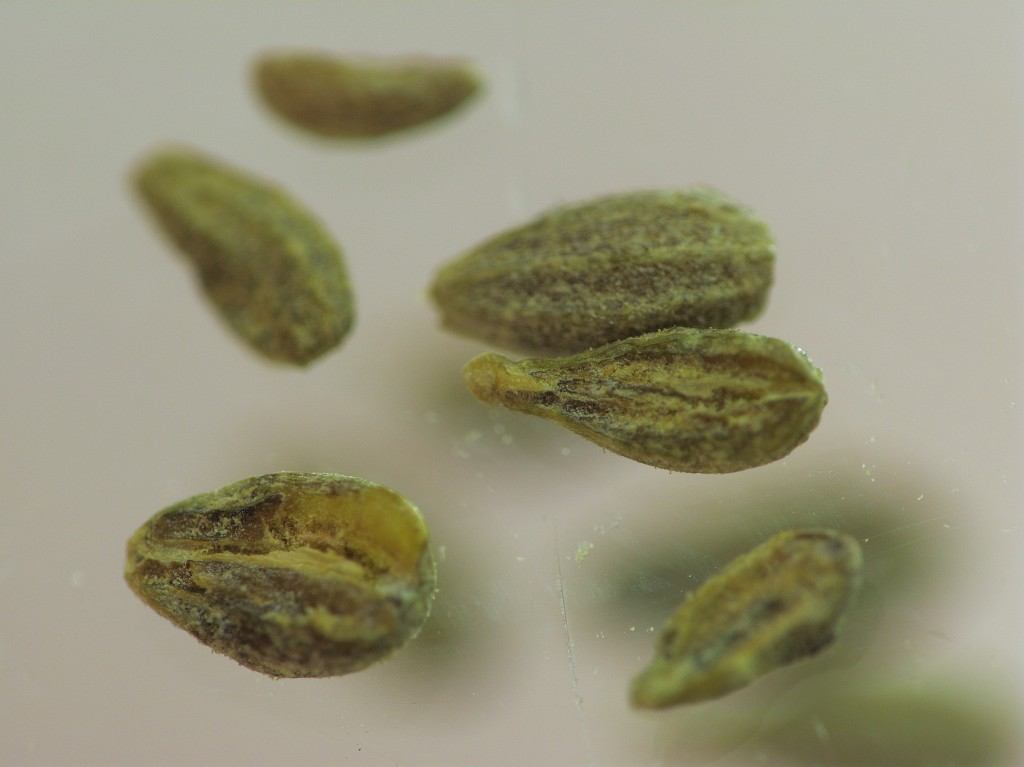 Some anise seeds.